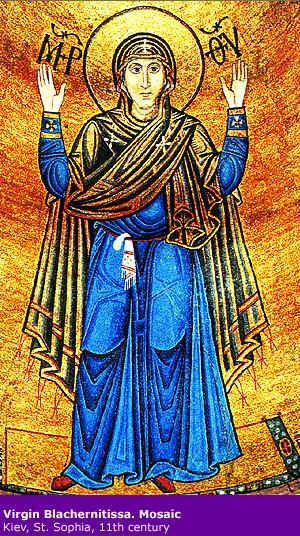 Orantas Dievmāte, 11.gs.,Sv.Sofijas katedrāle, Kijeva.